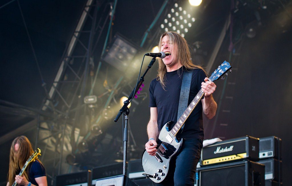 Angel Witch, actuando en el Hellfest de 2011.